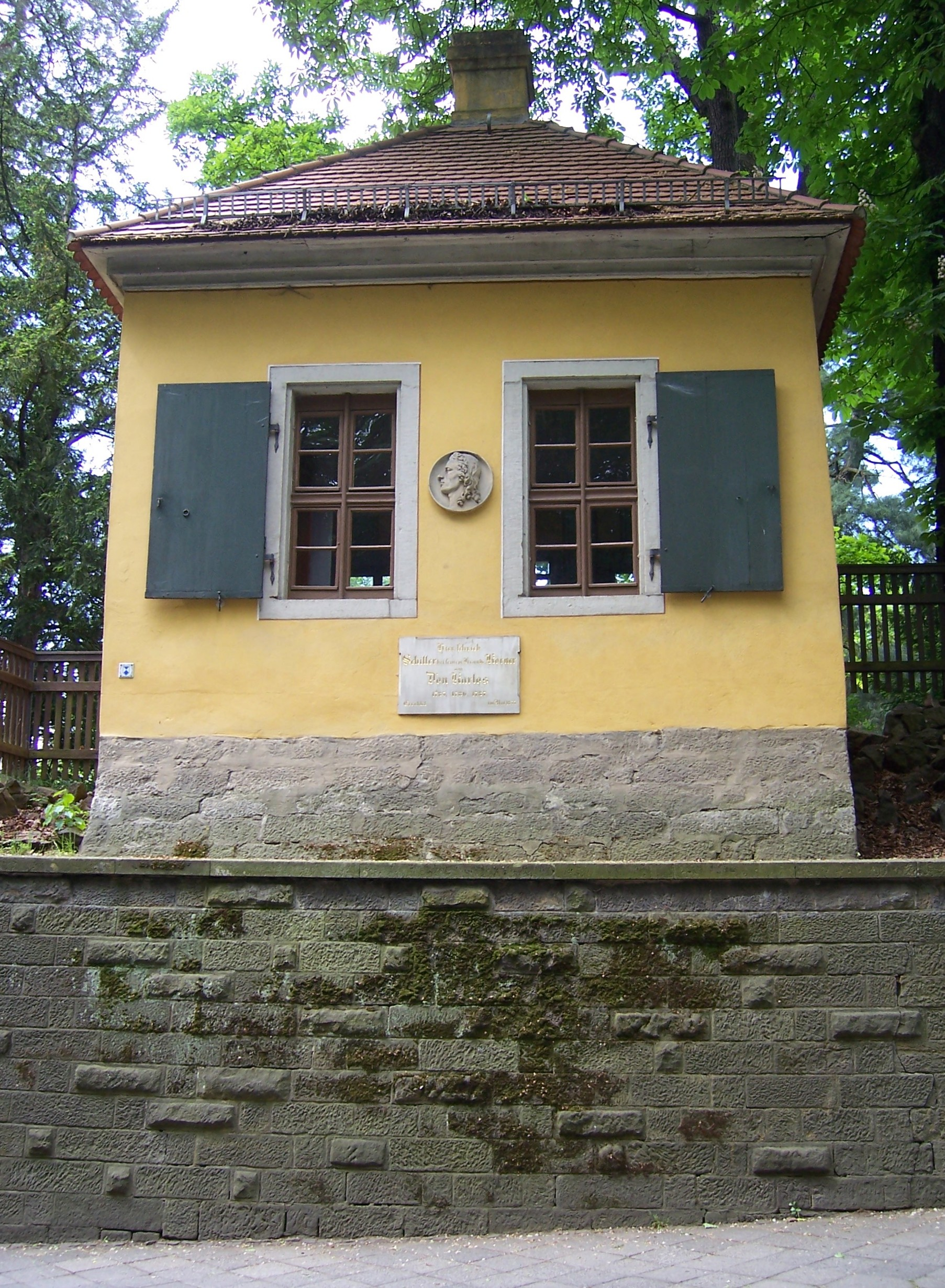 Straßenfront des Schillerhäuschens in Dresden-Loschwitz